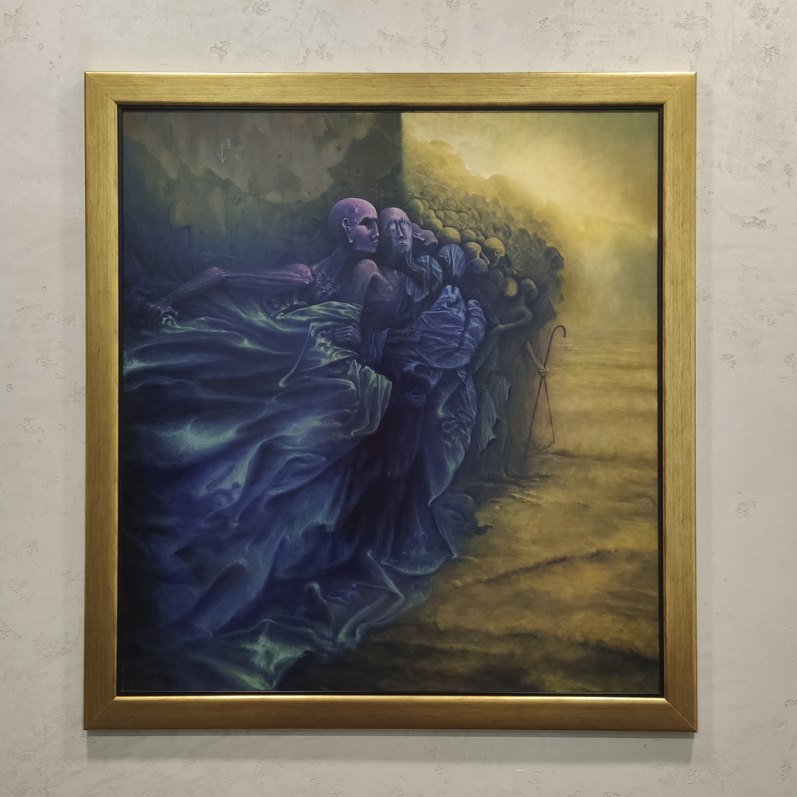 Obraz autorstwa Krzysztofa Heksel